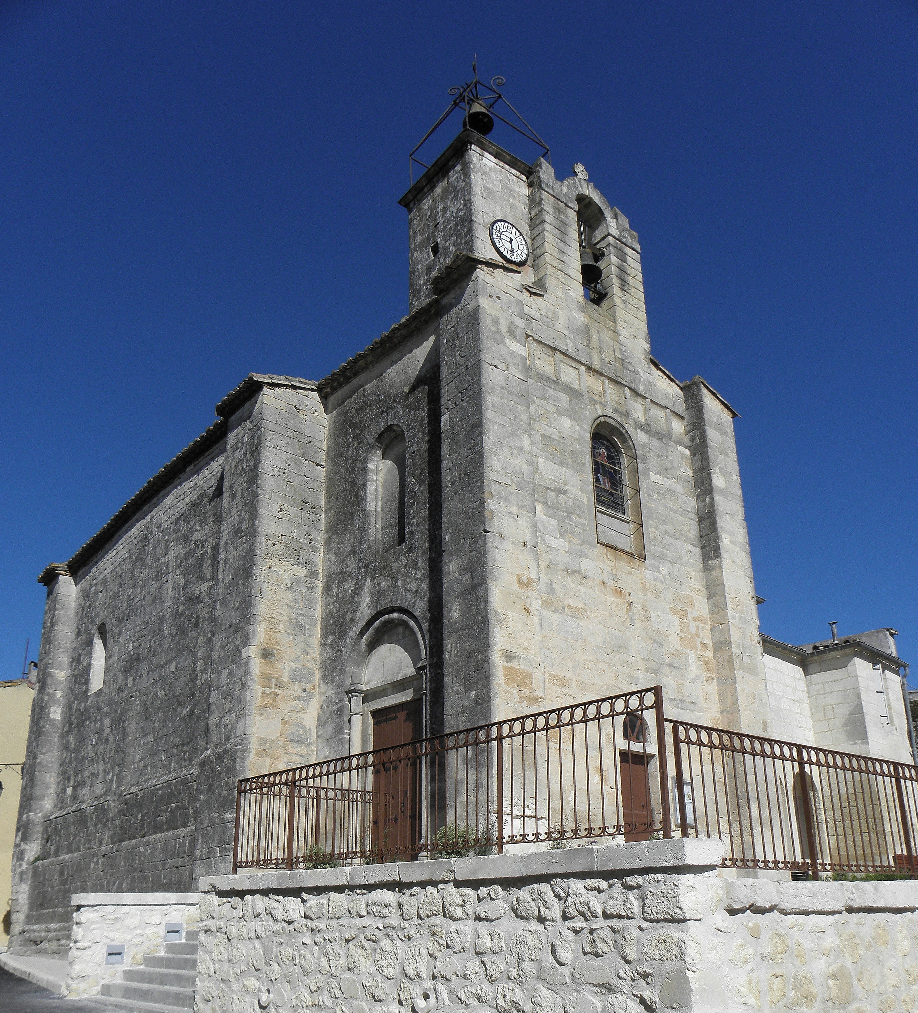 Église Saint-Martin de Sussargues (34). Façade occidentale et flanc nord.